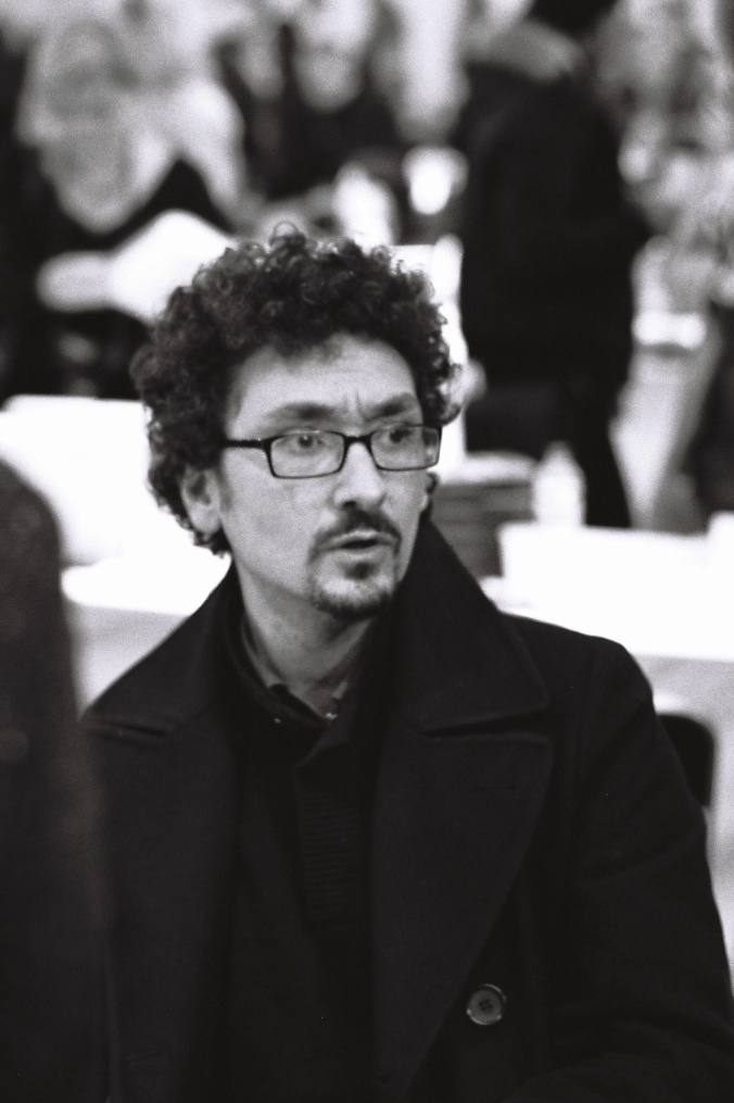 David Foenkinos au salon du livre Radio France, 26 novembre 2011